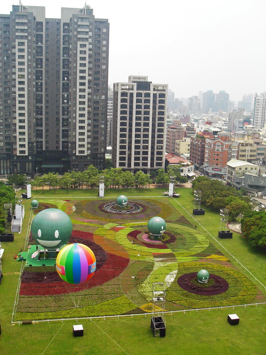 台中市經國園道裡市民廣場上的台中花毯造景